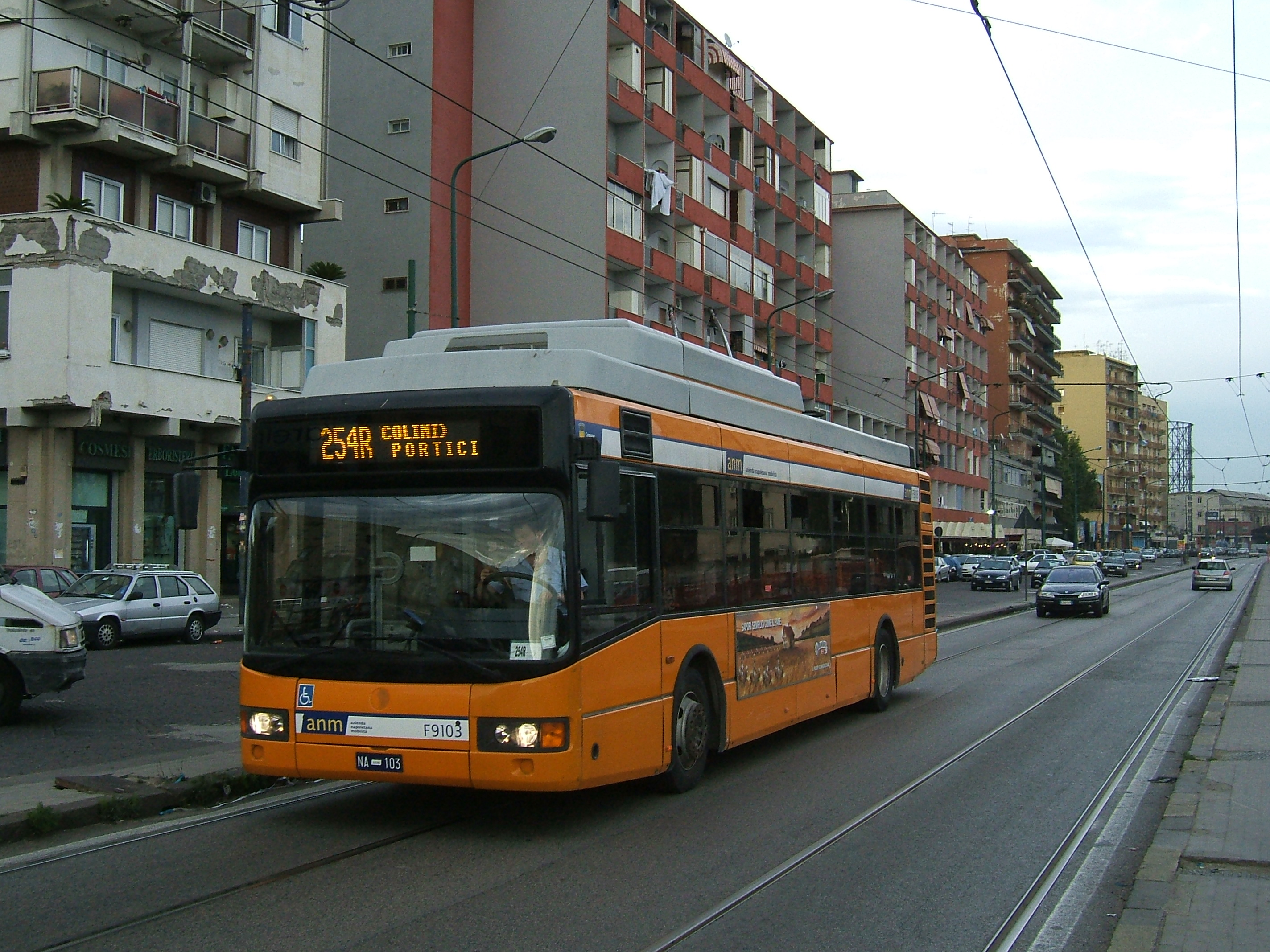 Neapolský trolejbus AnsaldoBreda